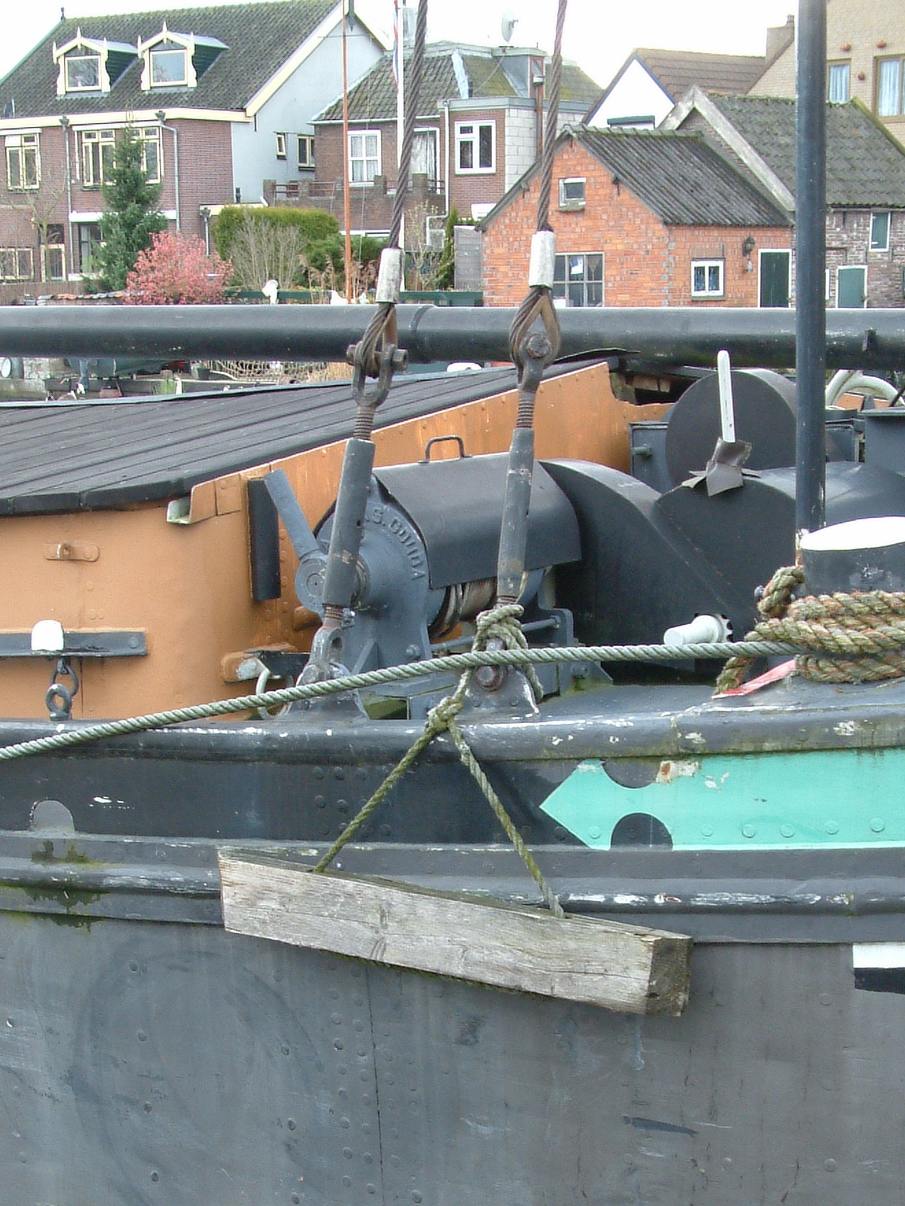 Een wrijfhoutje. Een wrijfhoutje wordt gebruikt om de huid van een schip te beschermen bij het afmeren.